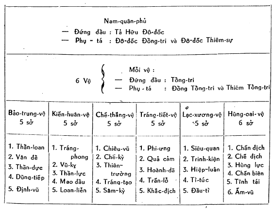 Nam quân phủ thời Lê Thánh Tông. Nguồn: Tổ chức chính quyền trung ương dưới triều Lê Thánh Tông. Tác giả Lê Kim Ngân, do Bộ Quốc Gia Giáo Dục xuất bản năm 1963